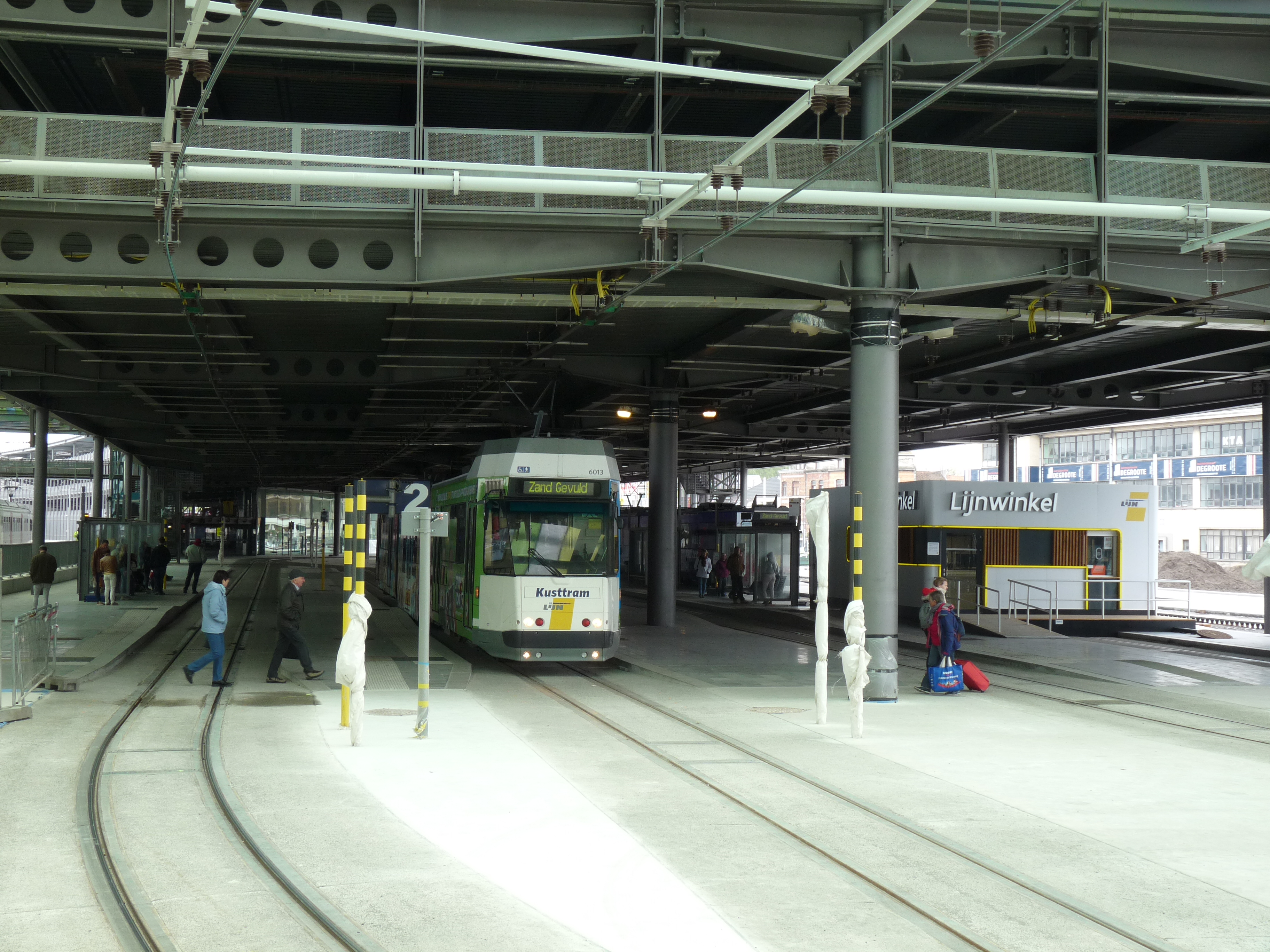 Geïntegreerde tram/treinstation in Oostende. Er wordt aangeduid dat zandreservoirs zijn gevuld en de tram in dienst mag rijden.